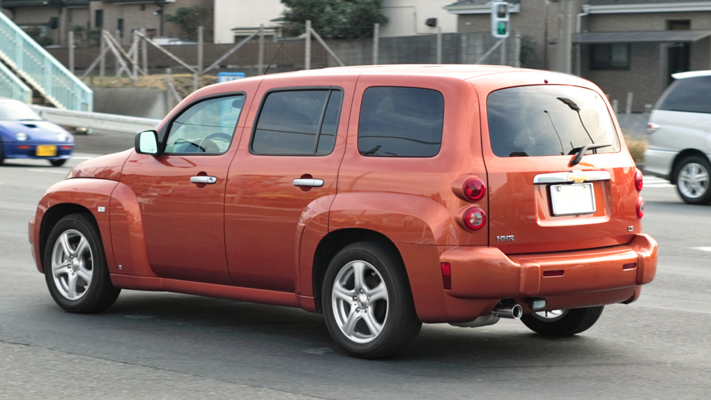 Chevrolet HHR